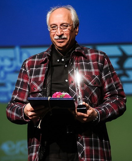 محمدجواد ضرابیان در چهارمین سال نوای موسیقی ایران ۲ آذر ۱۳۹۷ فرهنگسرای نیاوران